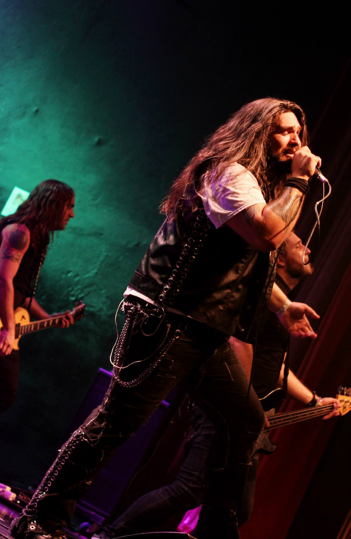 Voz de Helker